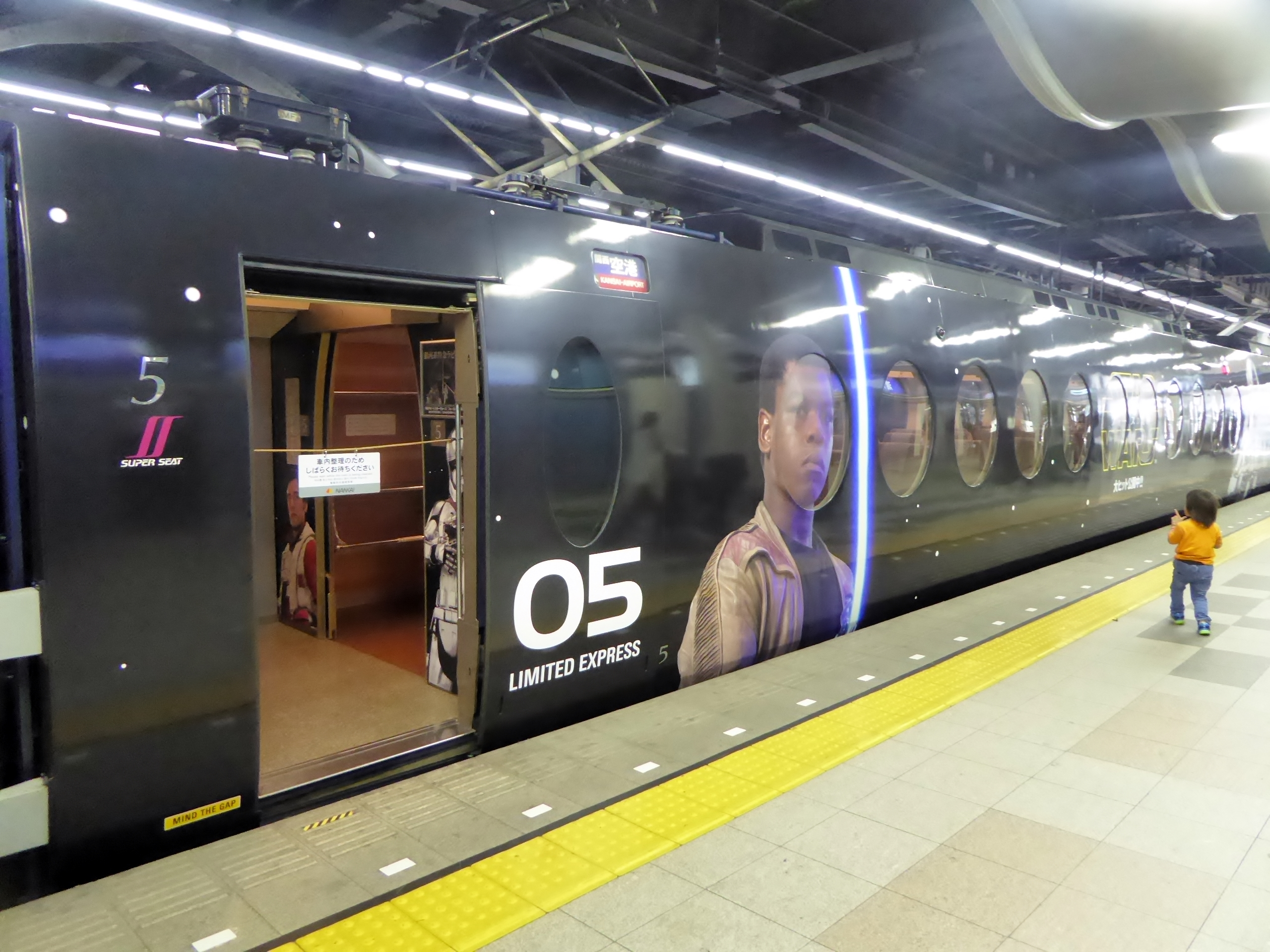 南海50000系電車ラピートの『スター・ウォーズ/フォースの覚醒』仕様を撮影。